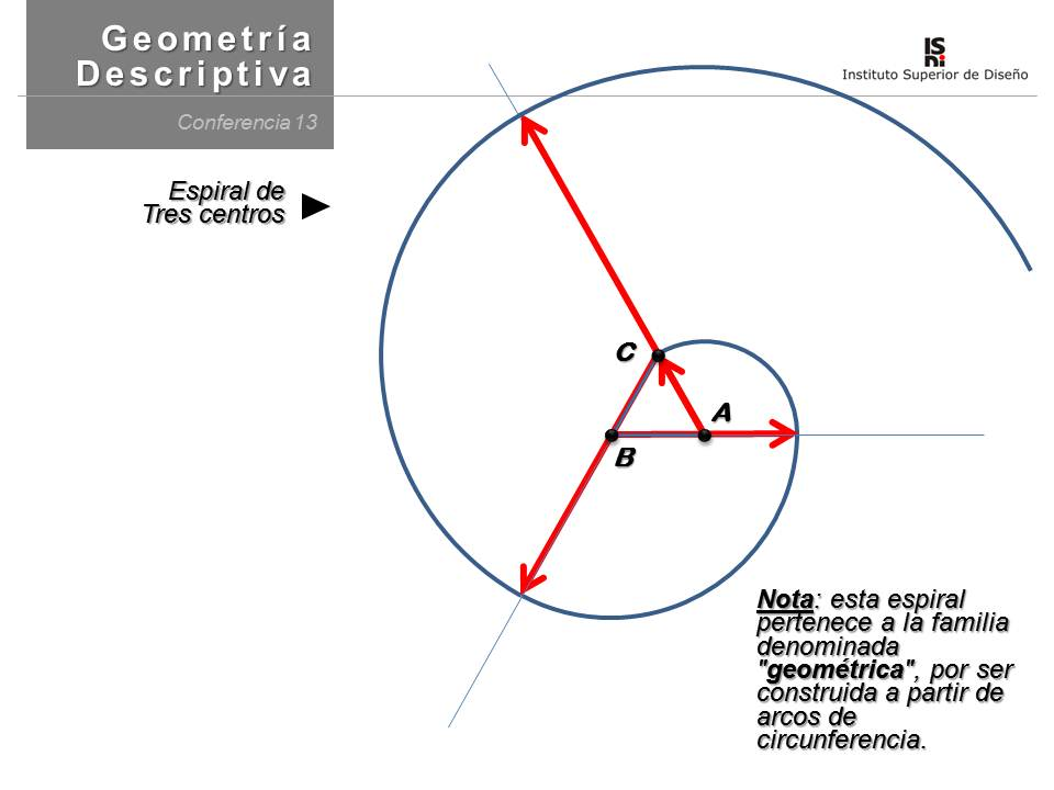 Método práctico para la construcción de una espiral geométrica.